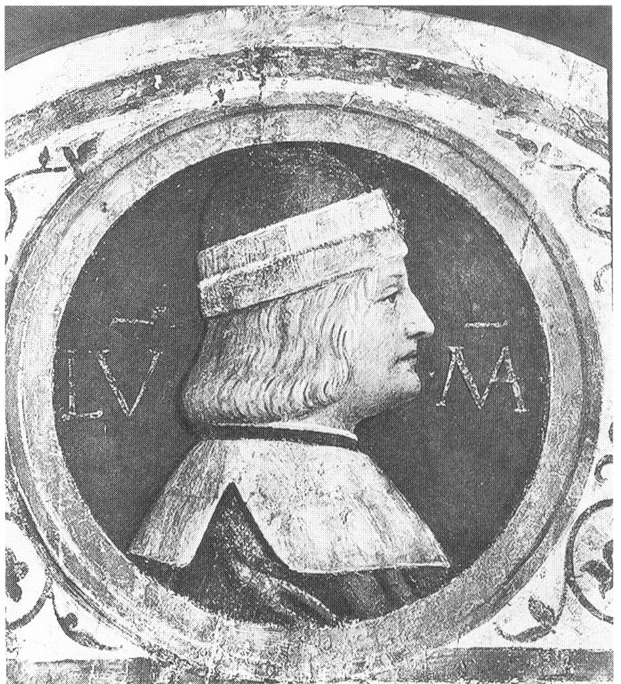 Ludovico Moro Sforza, Herzog von Mailand - Maximilian I. zweiter Schwiegervater Lunettenbild.